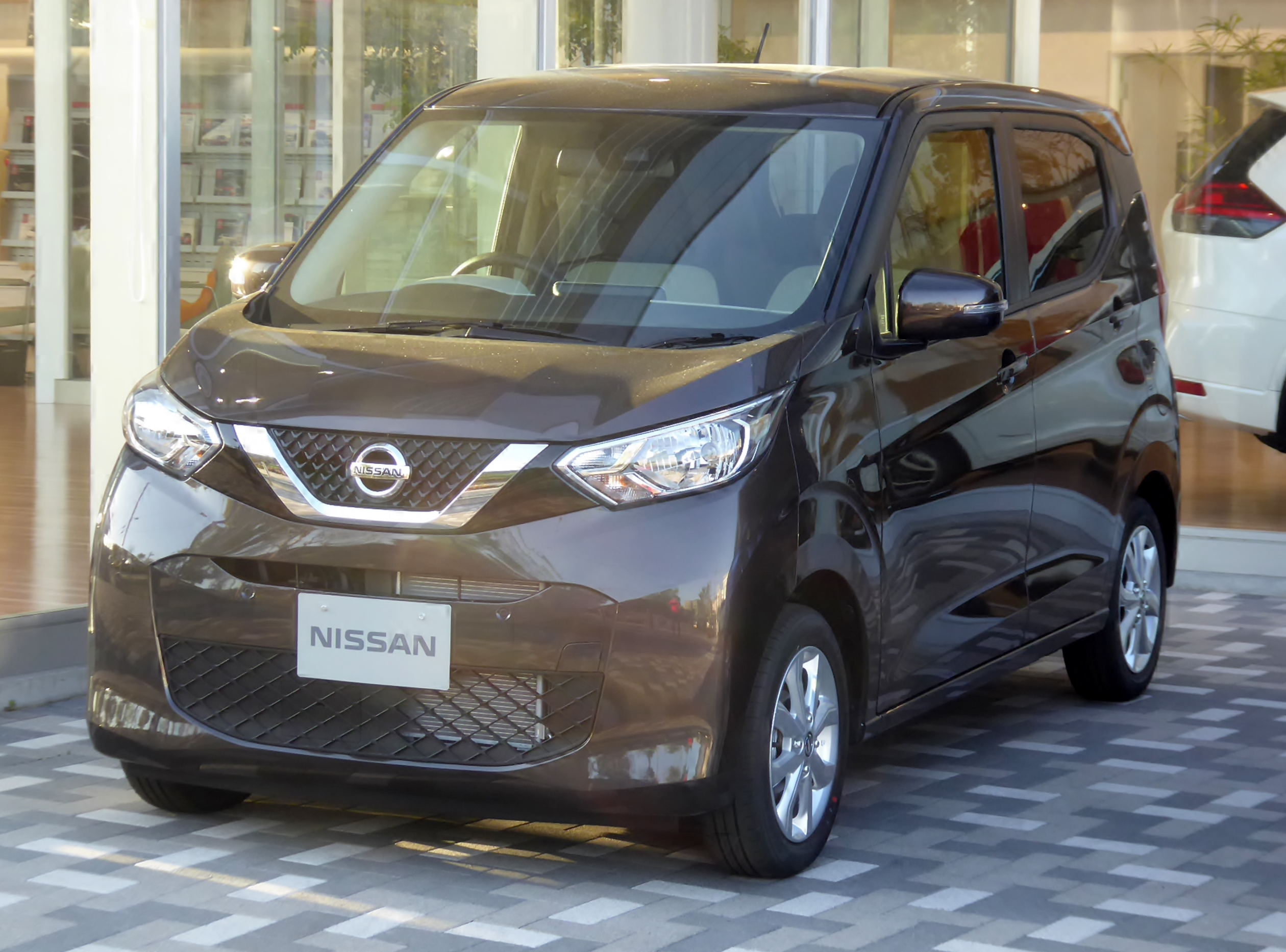 5BA-B43W型日産・デイズXを撮影。